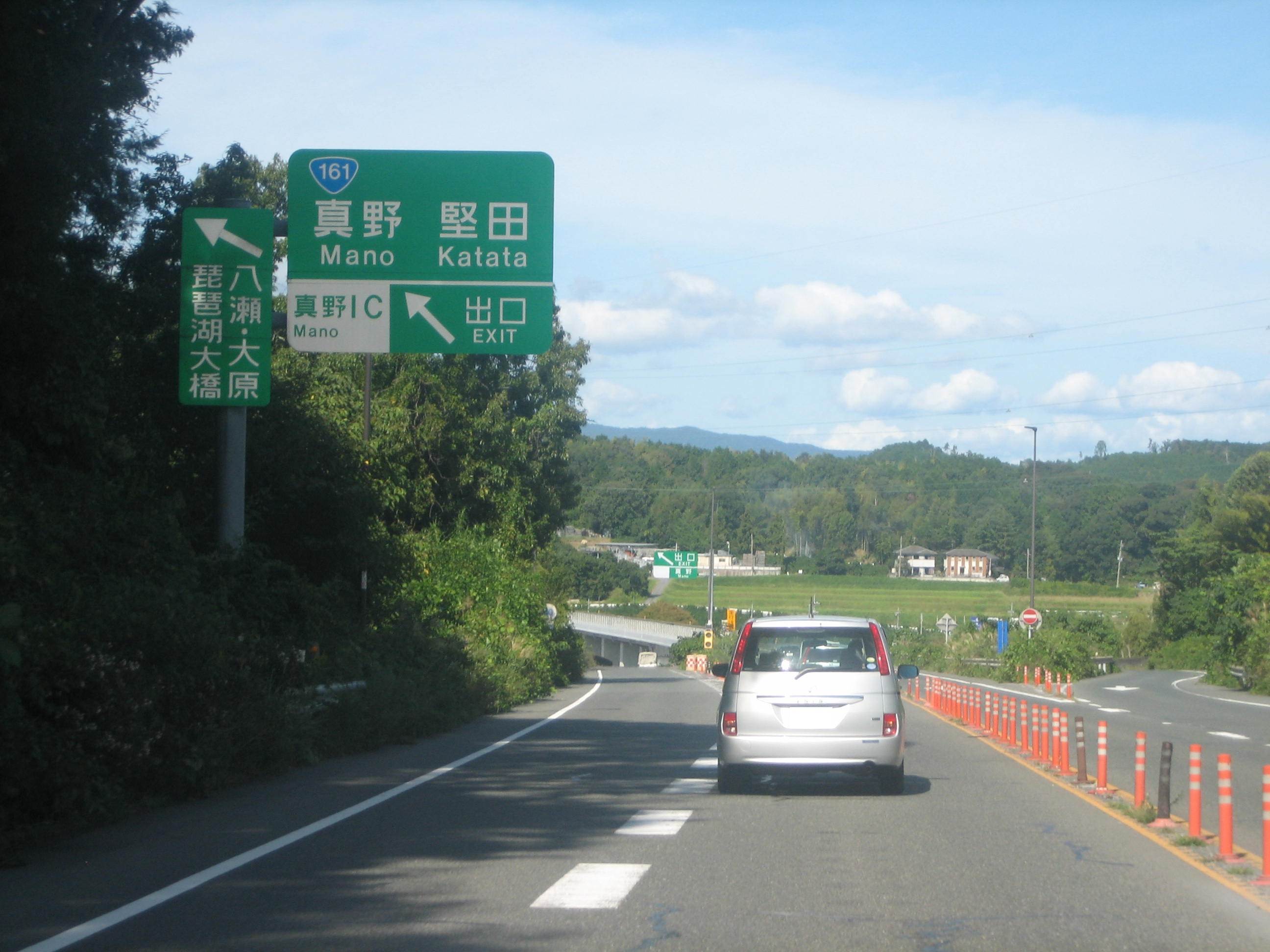 真野IC分岐